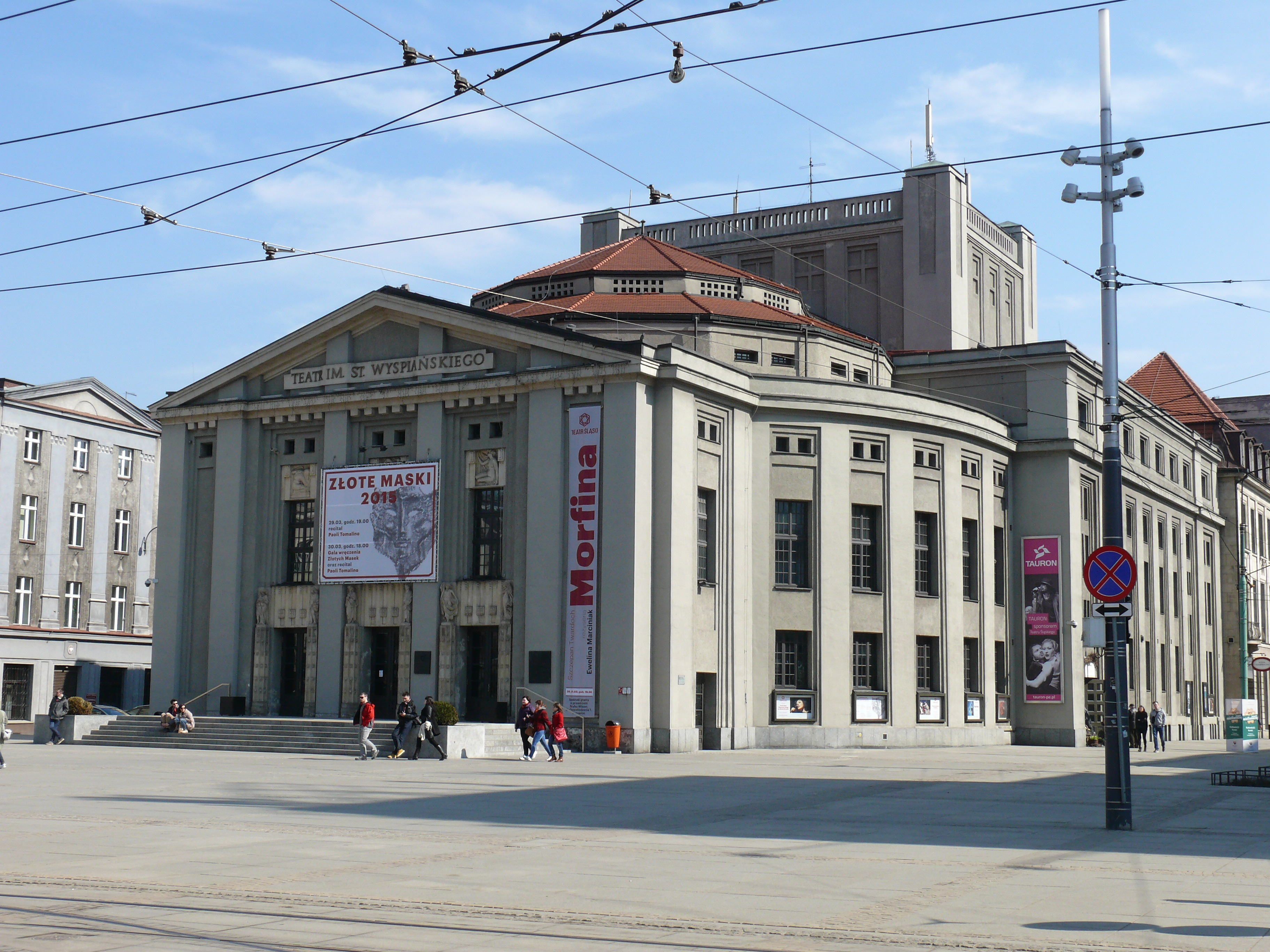 Das Schlesische Theater auf dem Rynek in Katowice.